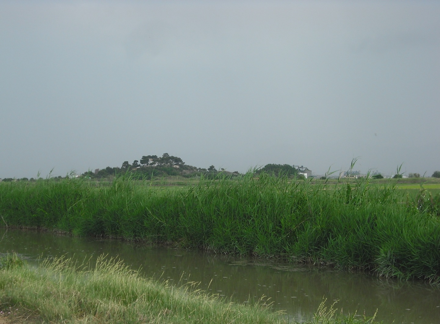 Muntanyeta dels Sants.